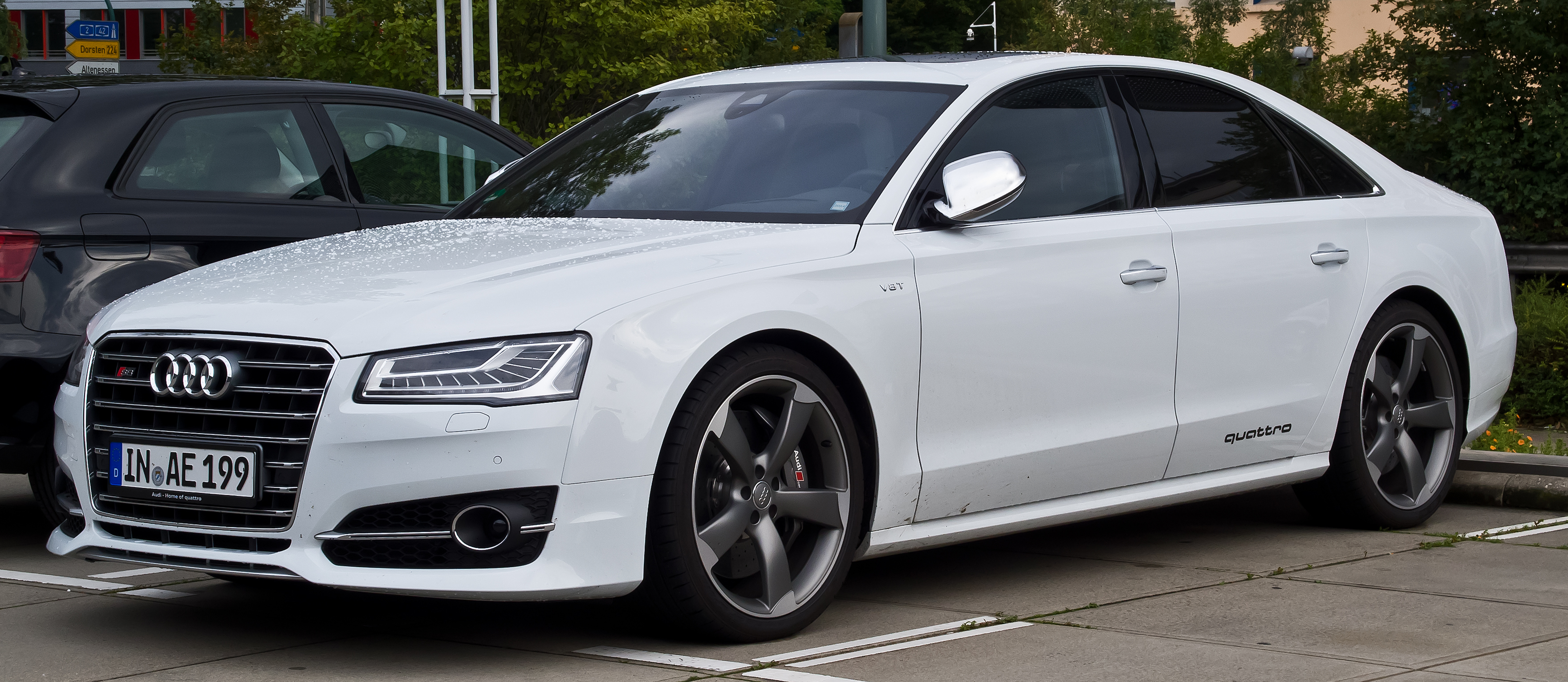 Audi S8 (D4, Facelift)